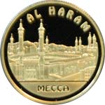 Памятная монета Республики Казахстан - Серия "Знаменитые мечети мира - Мекка" - Реверс - 500 тенге - золото